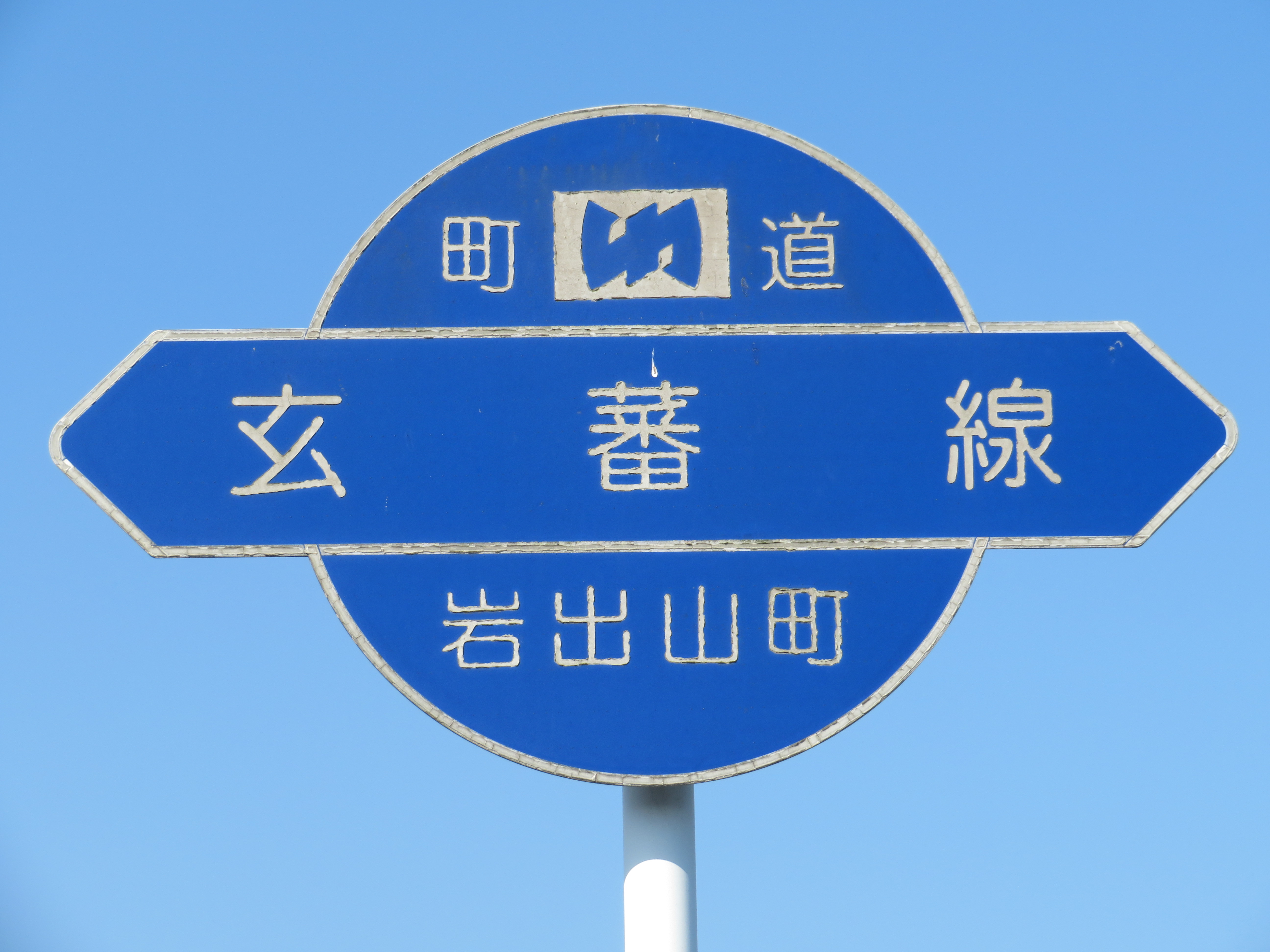 宮城県にある大崎市道玄蕃線（旧岩出山町道玄蕃線）の標識